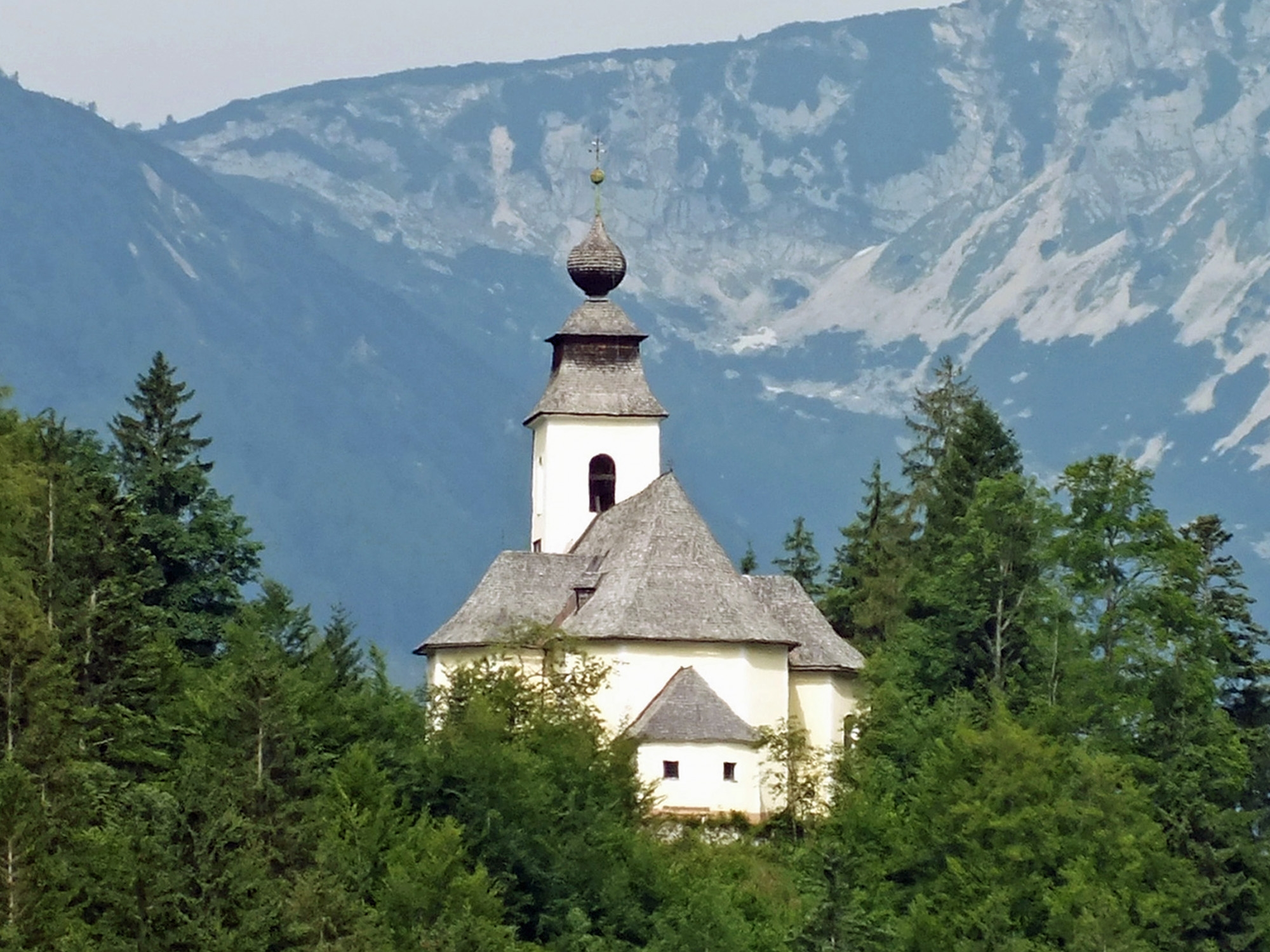 Kirche Maria am Kumitzberg in Bad Mitterndorf-Obersdorf